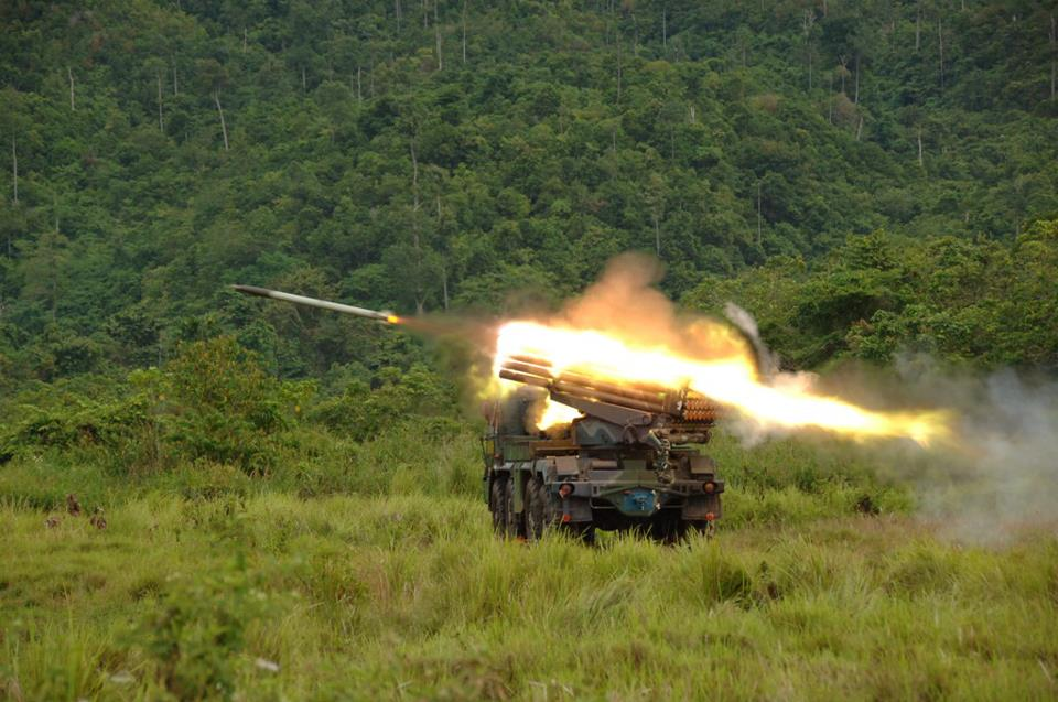 Pantai Sekerat Di Bombardir Pasukan Amfibi Marinir Dentuman tembakan mortir, meriam, roket serta senjata mesin ringan dan berat terdengar menggelegar meluluhlantakan kedudukan musuh di sepanjang perbukitan pantai Sekerat Sangata Kutai Timur, pada Latgab TNI Tingkat Brigade TA. 2012, Jumat (16/11).